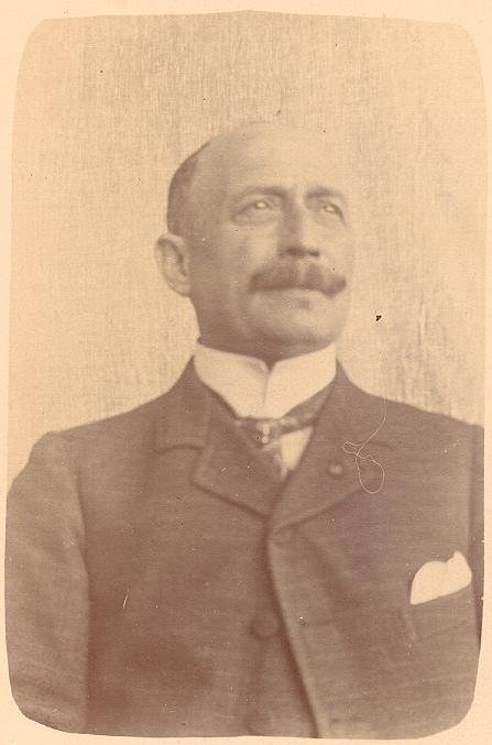 Photo de Charles Michel, sinologue, âgé. Charles MICHEL, sinologue belge, époux de Isabelle STRAATMAN. Marie Octavie Pétronille Camille Hermance Françoise Joséphine Henriette Charlotte dite Isabelle STRAATMAN à Saint-Josse ten Noode le 30 octobre 1865, qui épousa le sinologue et diplomate Charles Pierre MICHEL , fils de Pierre et de Jeanne Jacqueline Adriaenssens, né à Flessingue (Hollande) le 9 janvier 1853 décédé en sa demeure Grand-Place à Bourgeois (Rixensart), le 26 juillet 1920. Isabelle STRAATMAN est la fille de Arnould Nicolas STRAATMAN, né le 15 juin 1835, décédé le 10 mars 1877, épousa à Laeken Marie Joséphine BRIDOUX, née à Bouillon le août 1842, fille de Jean-Baptiste et de Alexis Durmoir. Elle est la petite fille de l'armateur Lambert Straatman.